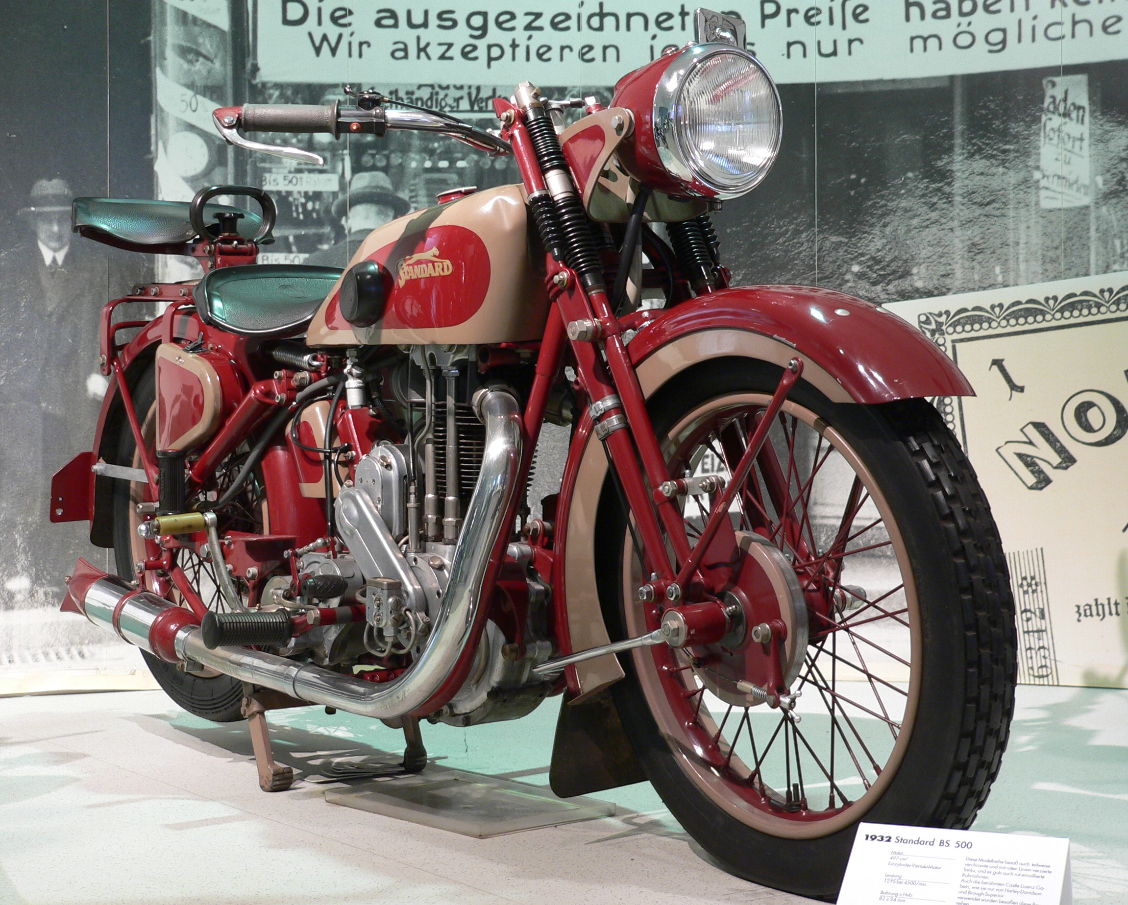 Motorbike "Standard BS 500" (1932) at the Deutsches Zweirad- und NSU-Museum (497 cm³, Einzylinder-Viertakt-Motor, 12 PS bei 4.500 U/min, 90 km/h)